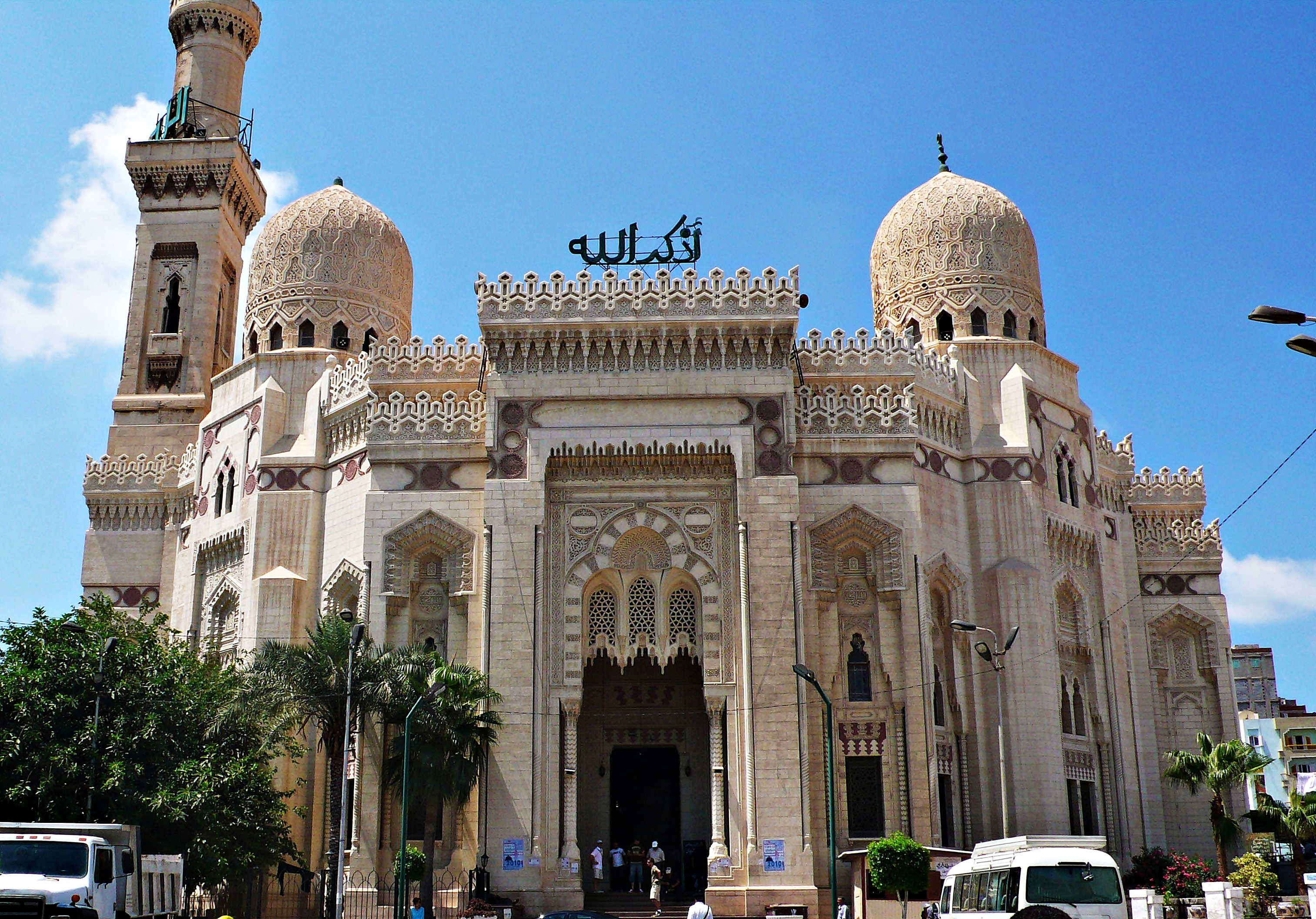 egipto